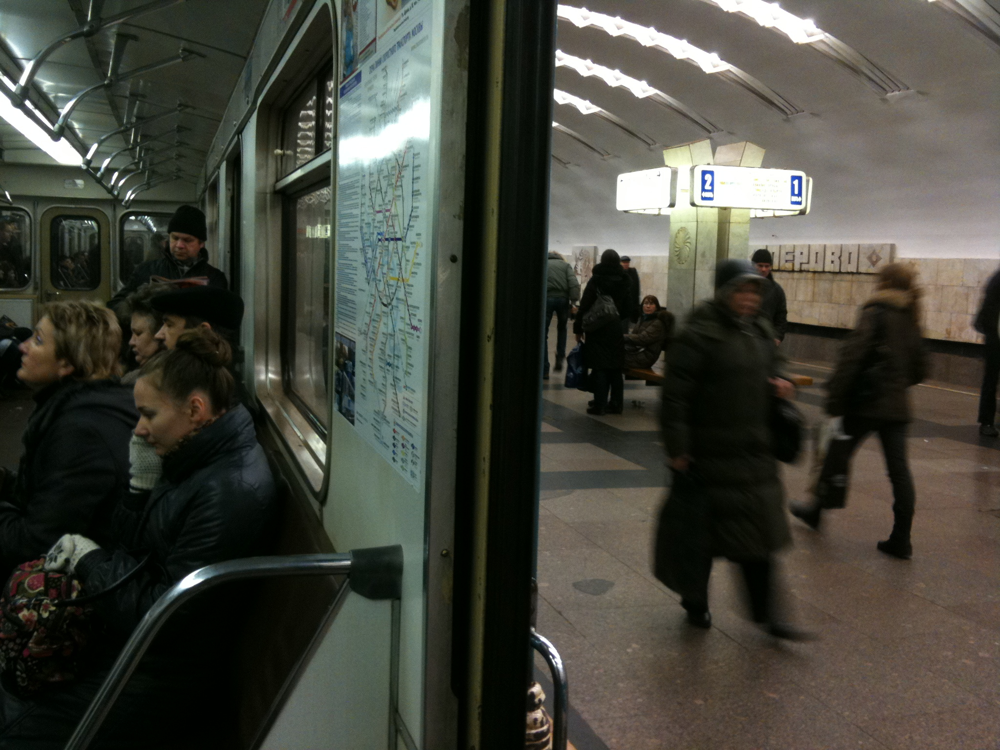 Perovo (Перово)